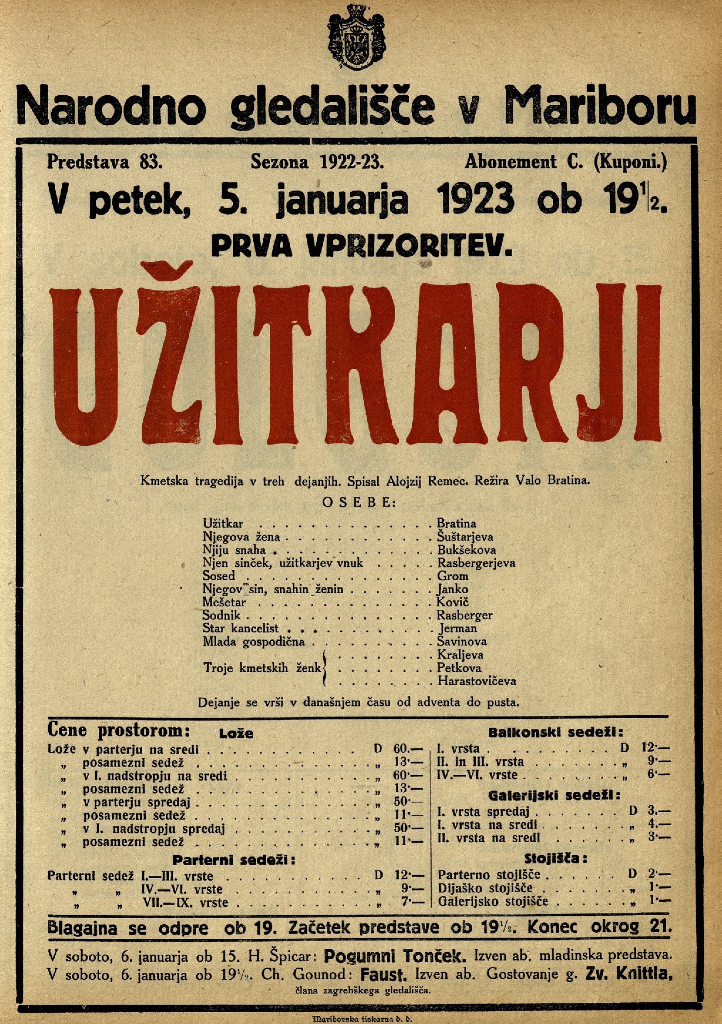 Plakat za predstavo Užitkarji v Narodnem gledališču v Mariboru.